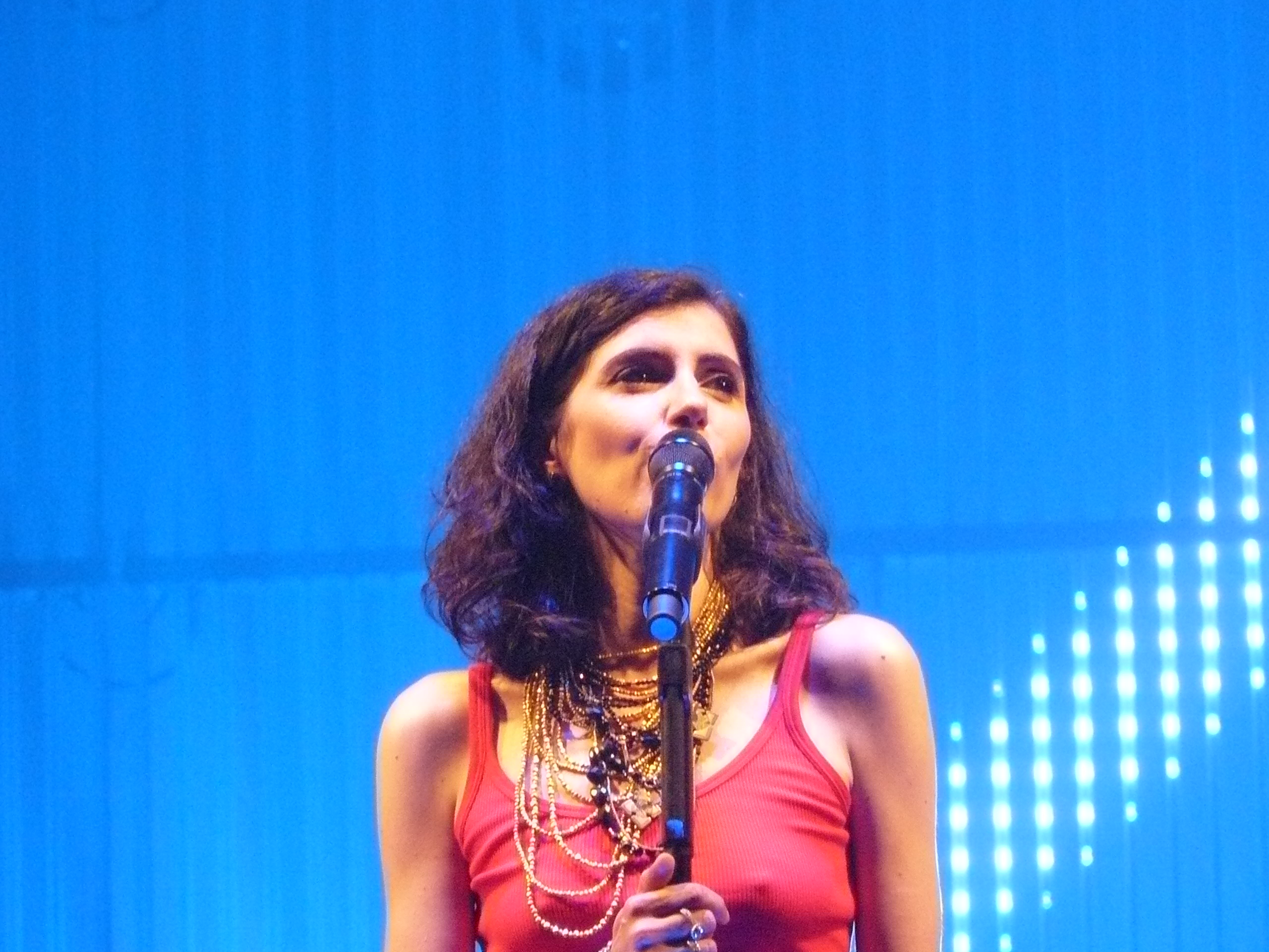 Tappa catanese dello Spirito Libero Tour del 2009